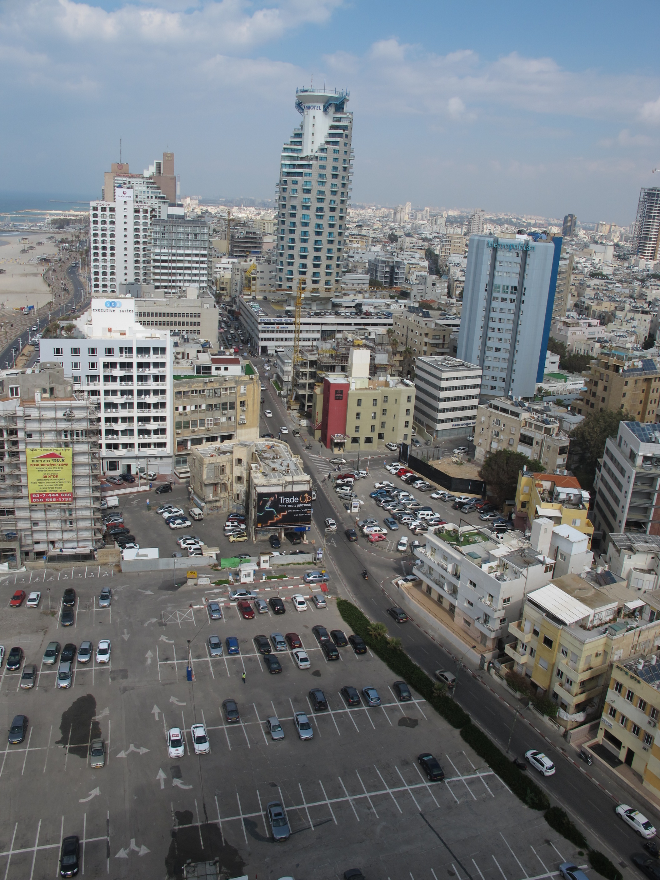 he:רחוב הירקון מגג בניין "מגדל האופרה"